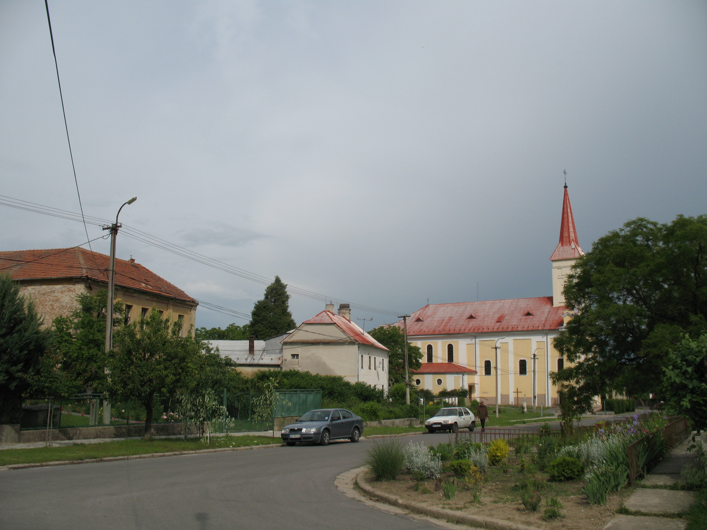 Komját